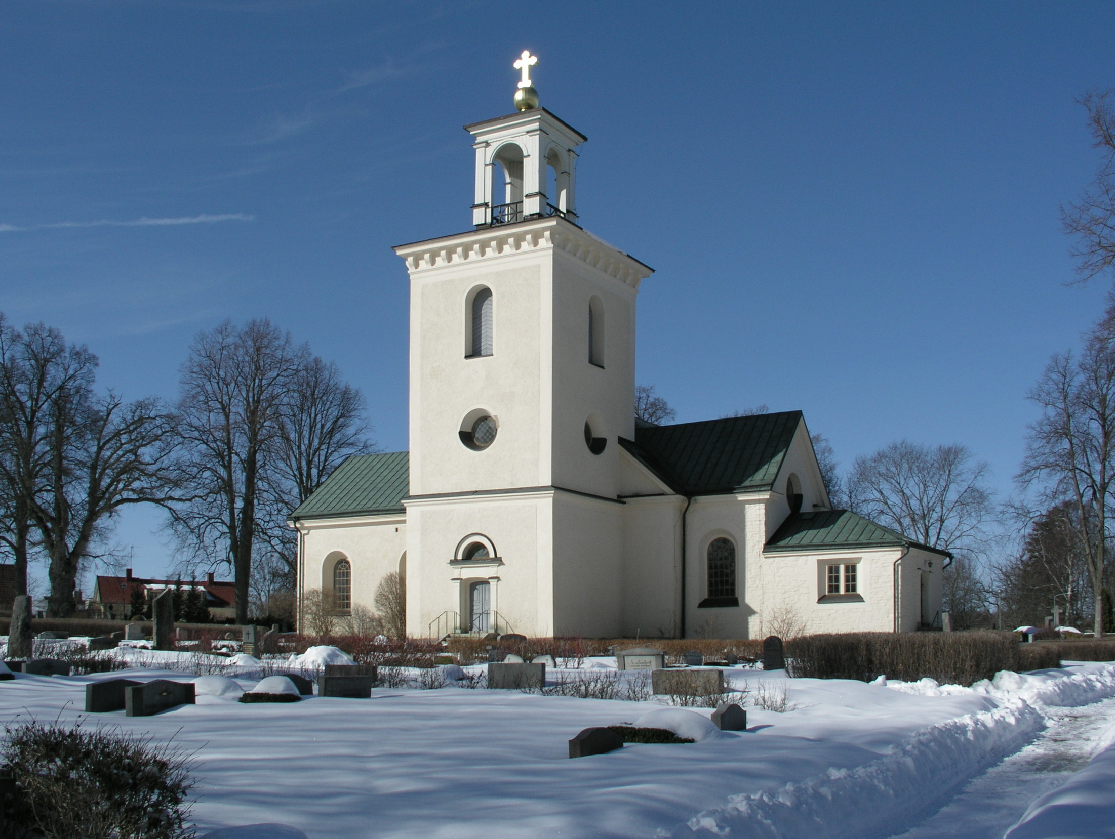 Kärna kyrka, Malmslätt. Diocese of Linköping. Sweden.